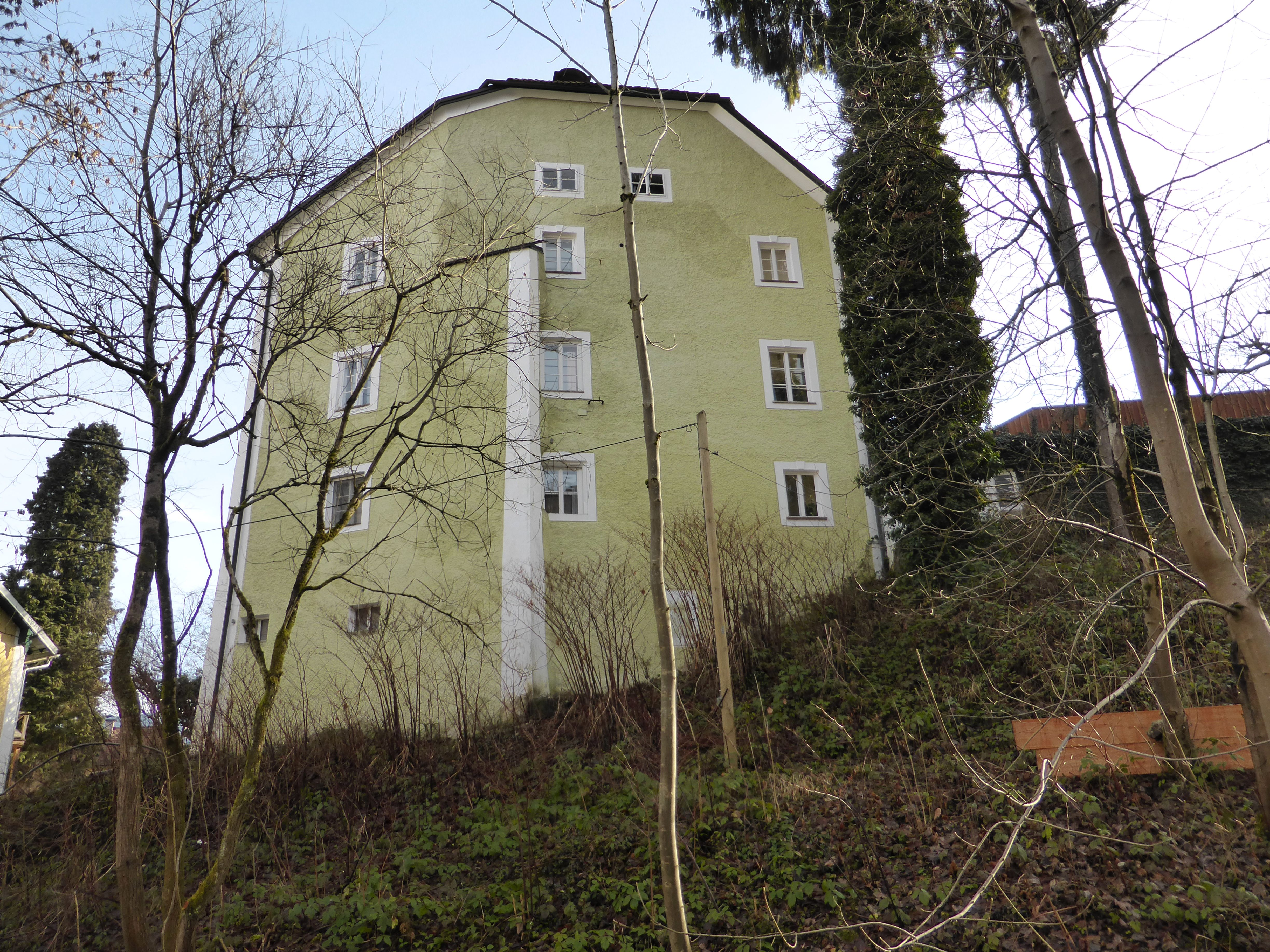 Wimmer-Schlössl